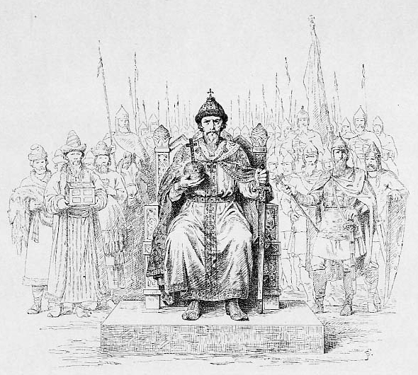 Великий Князь Всеволод III Юрьевич. 1176-1212 г.Преемник Михаила Юрьевича, Всеволод "Большое гнездо" (отец многочисленного семейства) мудрость и стремление к правосудию соединил с постоянством к достижению целей. Летописи называют его "Великим". Он имел влияние и на события в южной России.